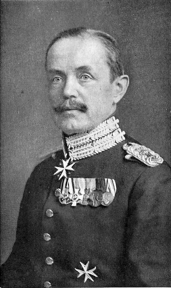 Oberst von Busse, letzter Friedens-Regimentskommandeur